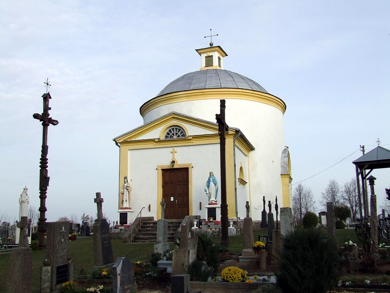 Dievo Apvaizdos church, Labūnava, Lithuania.